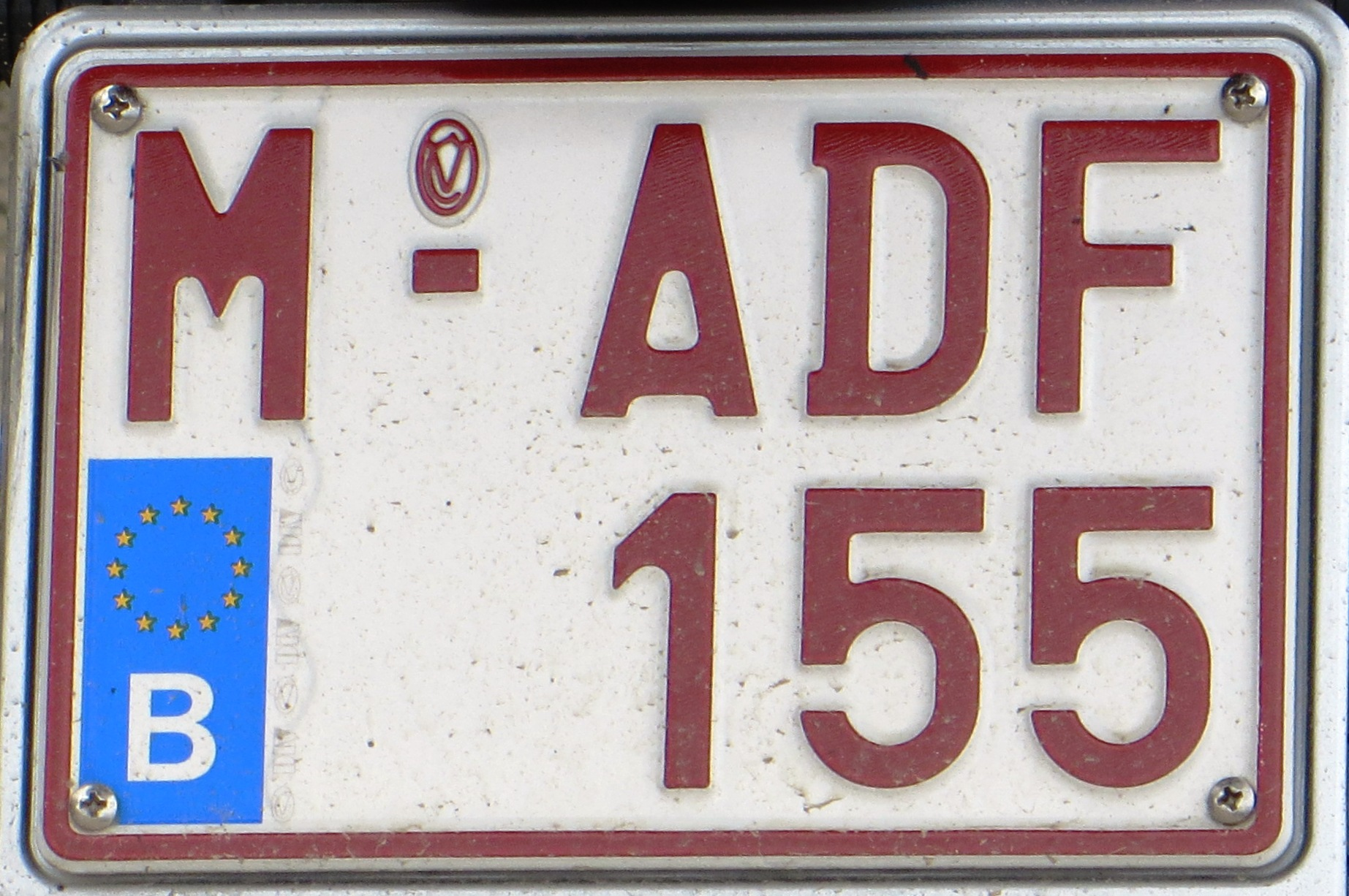 motorfiets kentekenplaat